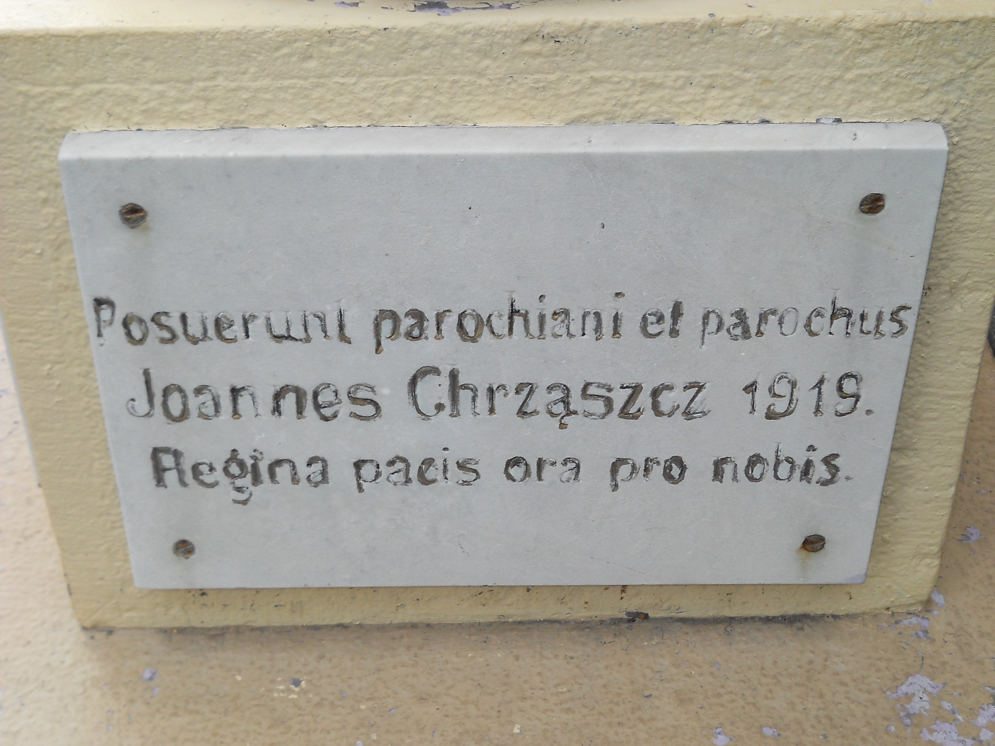 Pyskowice, ul. Poniatowskiego 10 - kościół parafialny pw. św. Mikołaja, kolumna maryjna, tablica (zabytek nr A/289/60 z 7.03.1960)